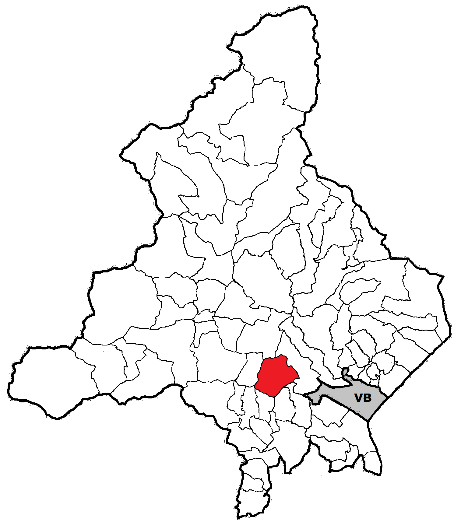 Posizione del comune nella provincia di Verbania